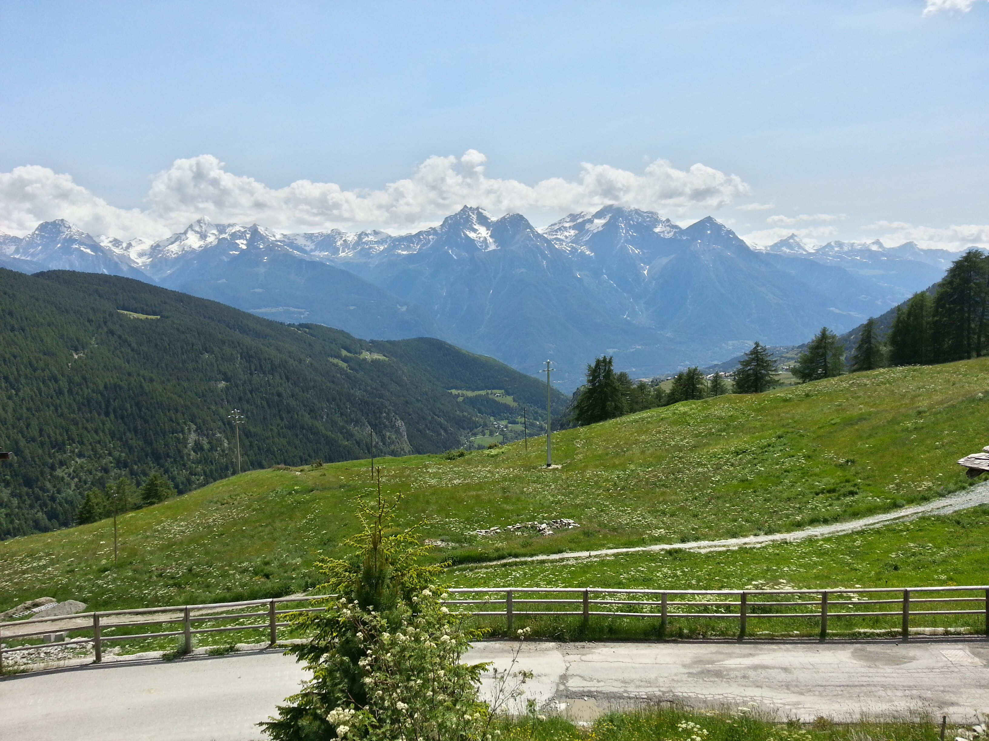 Gruppo del Mont Emilius scattata in frazione Porliod a Nus